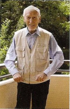 Fotografie pořízena na počátku 21. století (2001, Mearno)